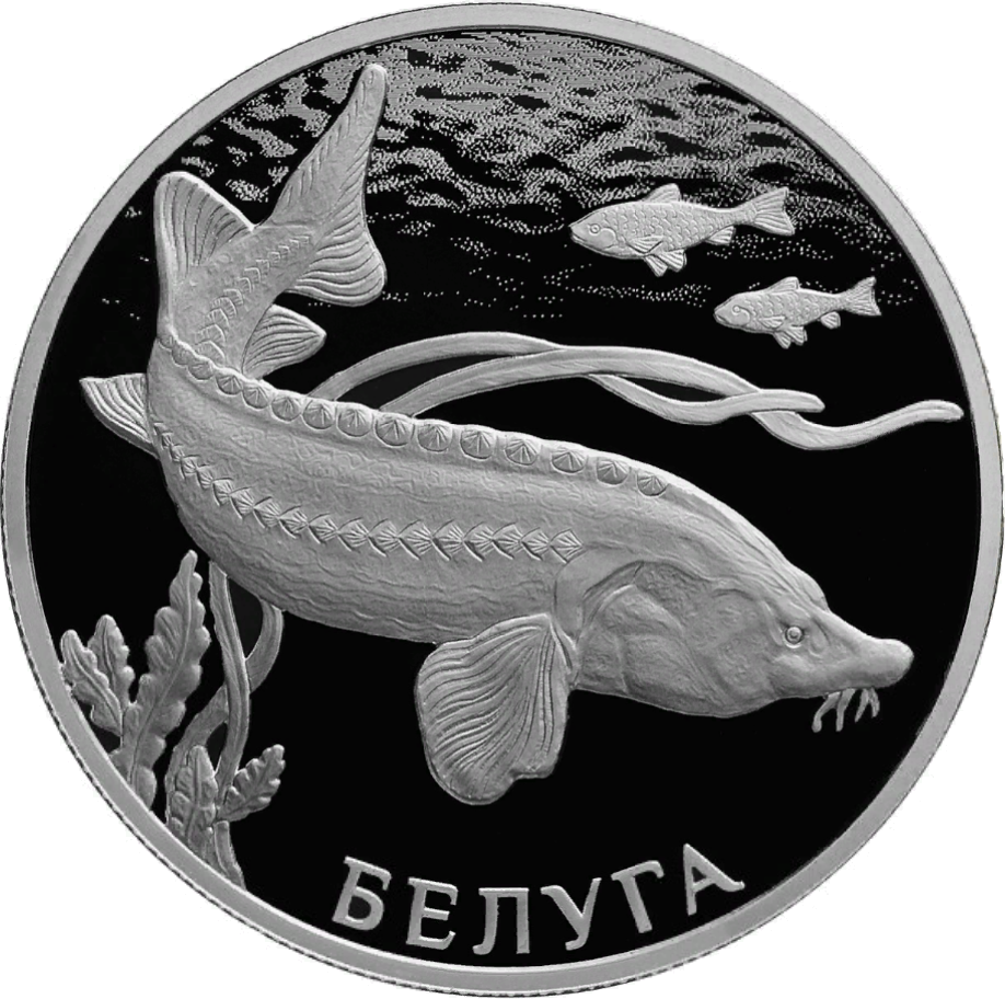 Монета Банка России — Красная книга: Белуга . 2 рубля, серебро, реверс. На зеркальном поле диска – рельефное изображение – рельефное изображение дальневосточного леопарда, внизу вдоль канта – надпись: «БЕЛУГА». Чеканка — Санкт-Петербургский монетный двор. Художник: Ф.С. Андронов. Скульптор: Ф.С. Андронов.